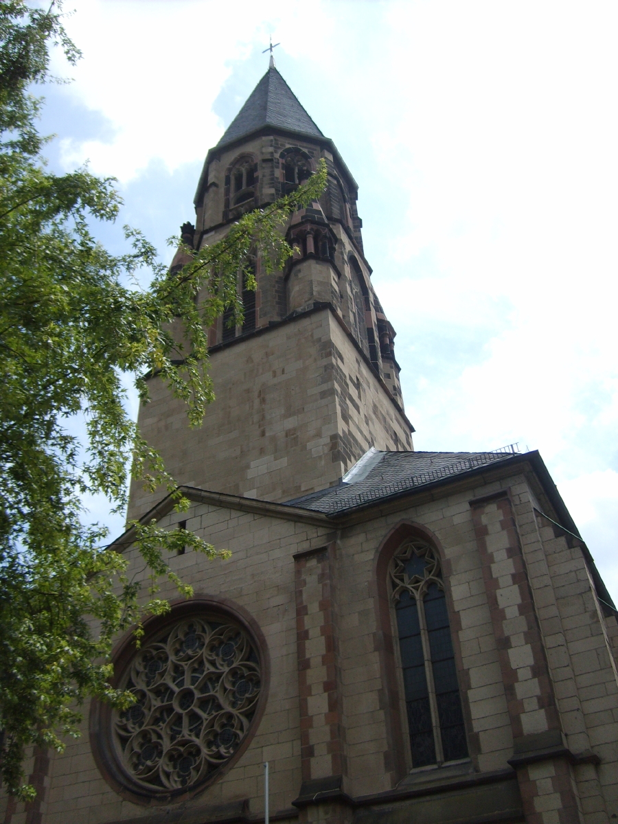 Fassade der Herz-Jesu-Kirche, Wuppertal-Barmen